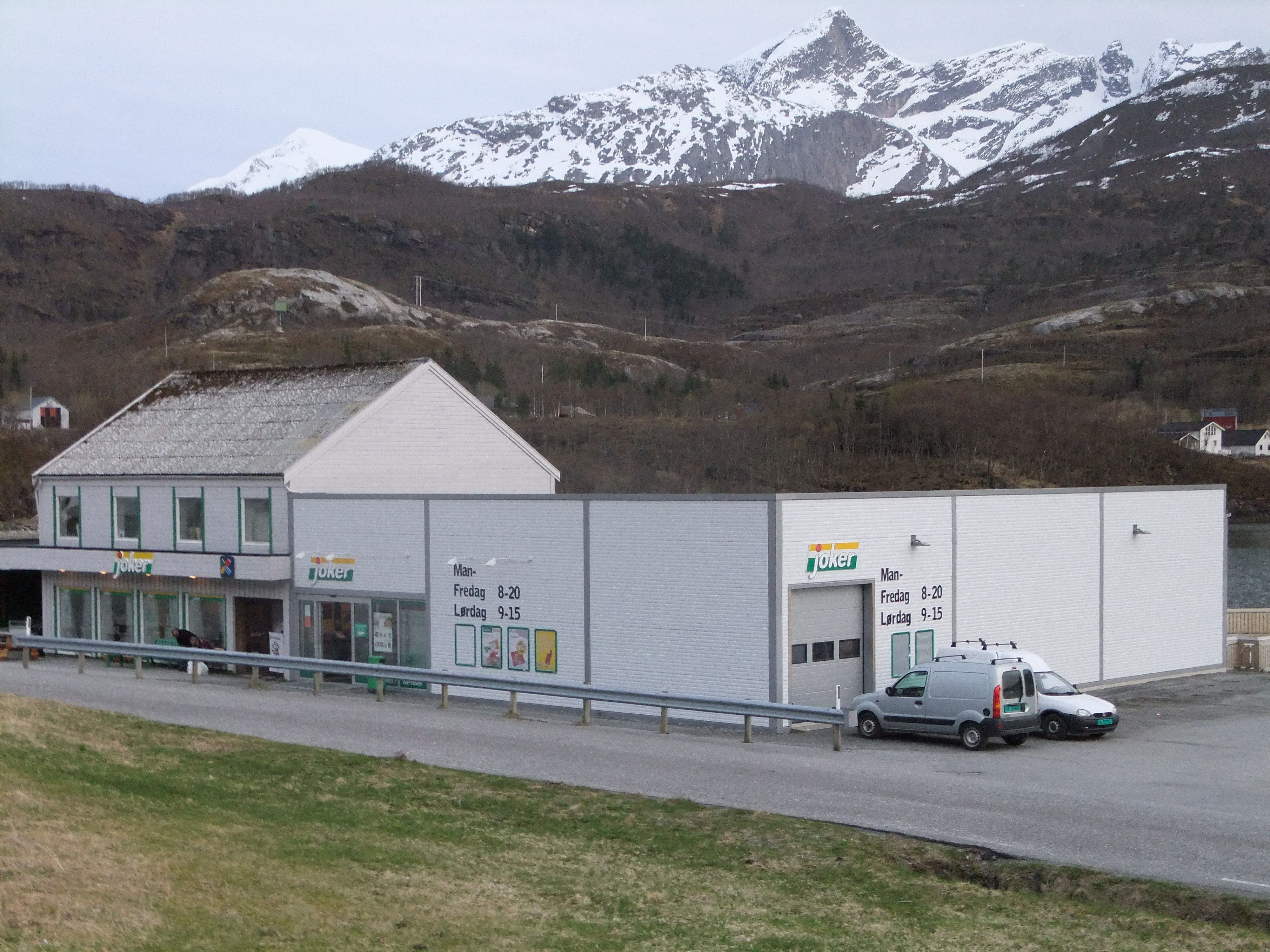 Butikken i Kvina, mai 2012